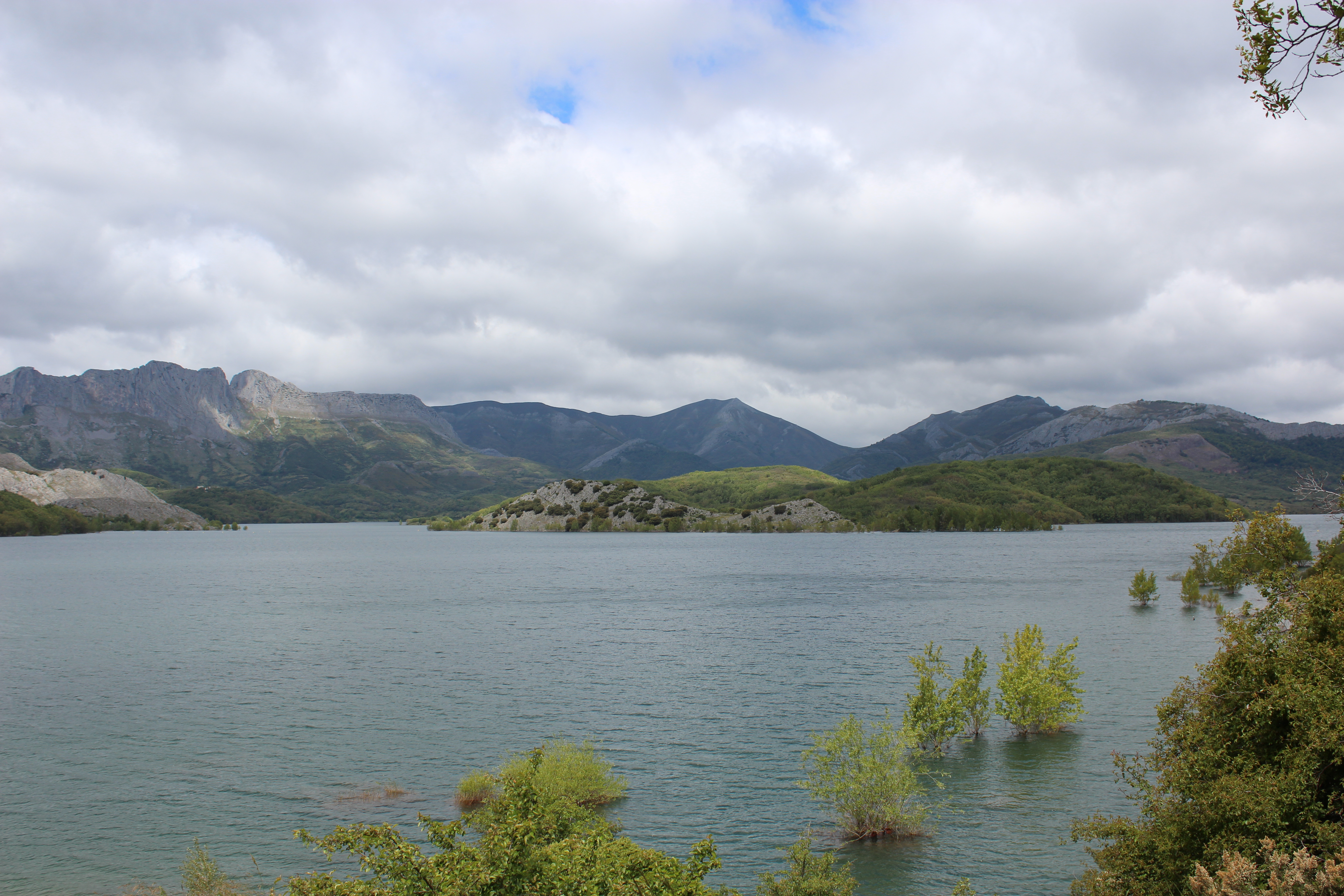 Pantano del Porma